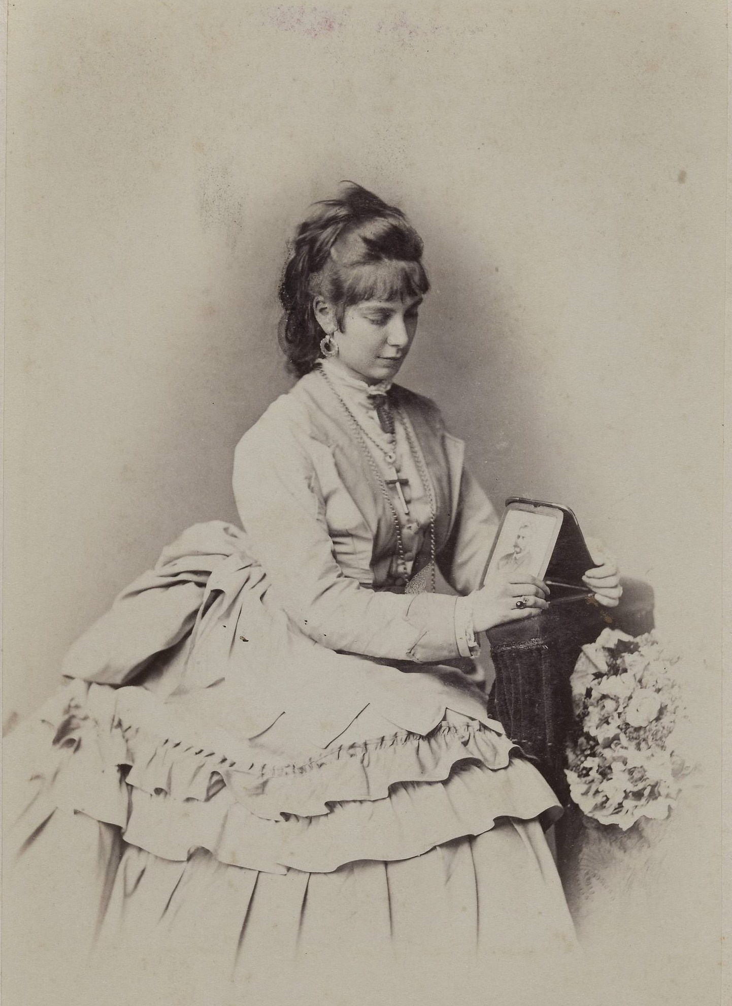 Альбертина Леопольдина Вильгельмина Юлиана Мария Велёпольский, ур. Монтенуово (1853—1895)